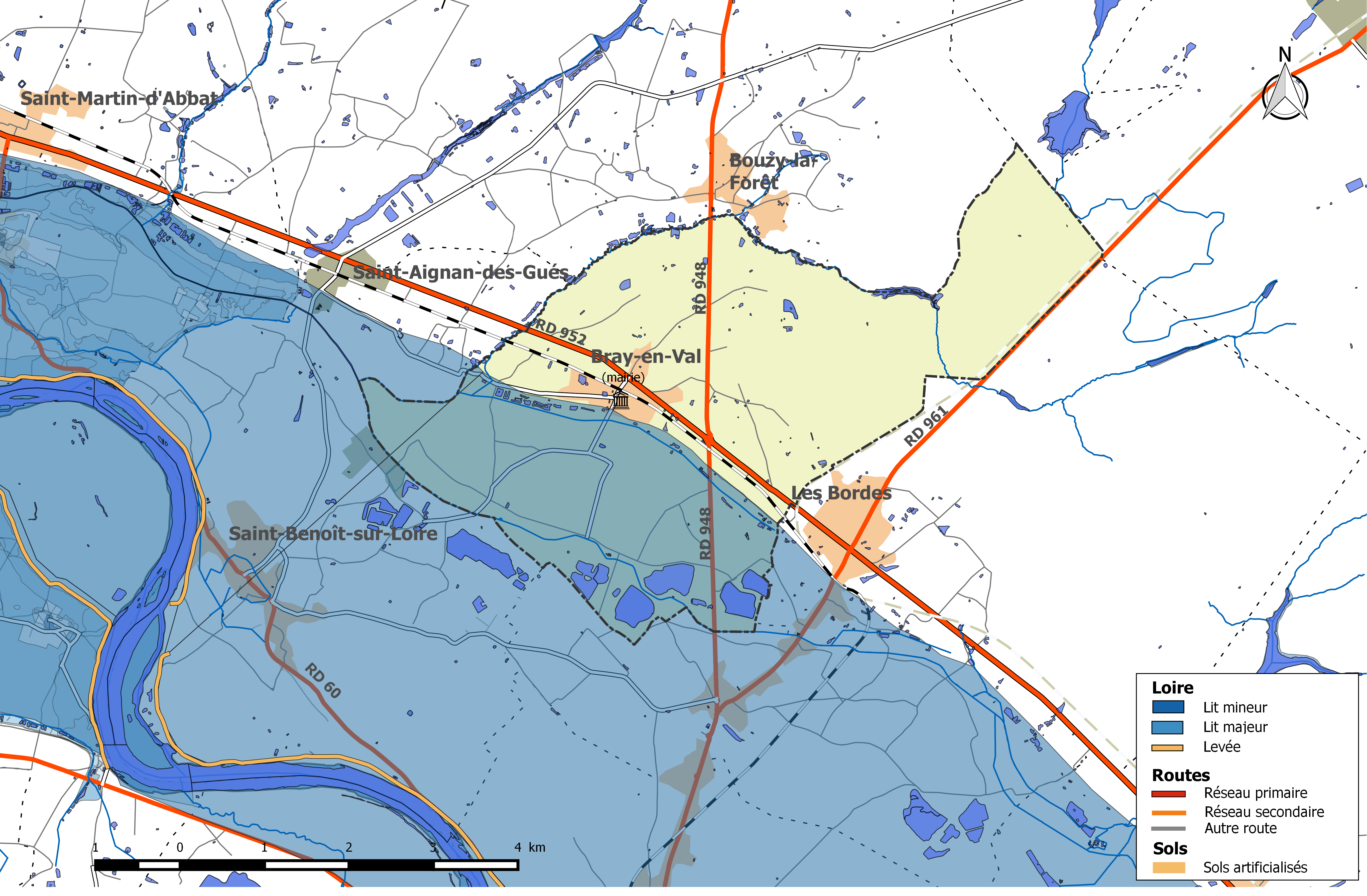 Zone inondable et réseaux hydrographique et routier de la commune de Bray-en-Val.